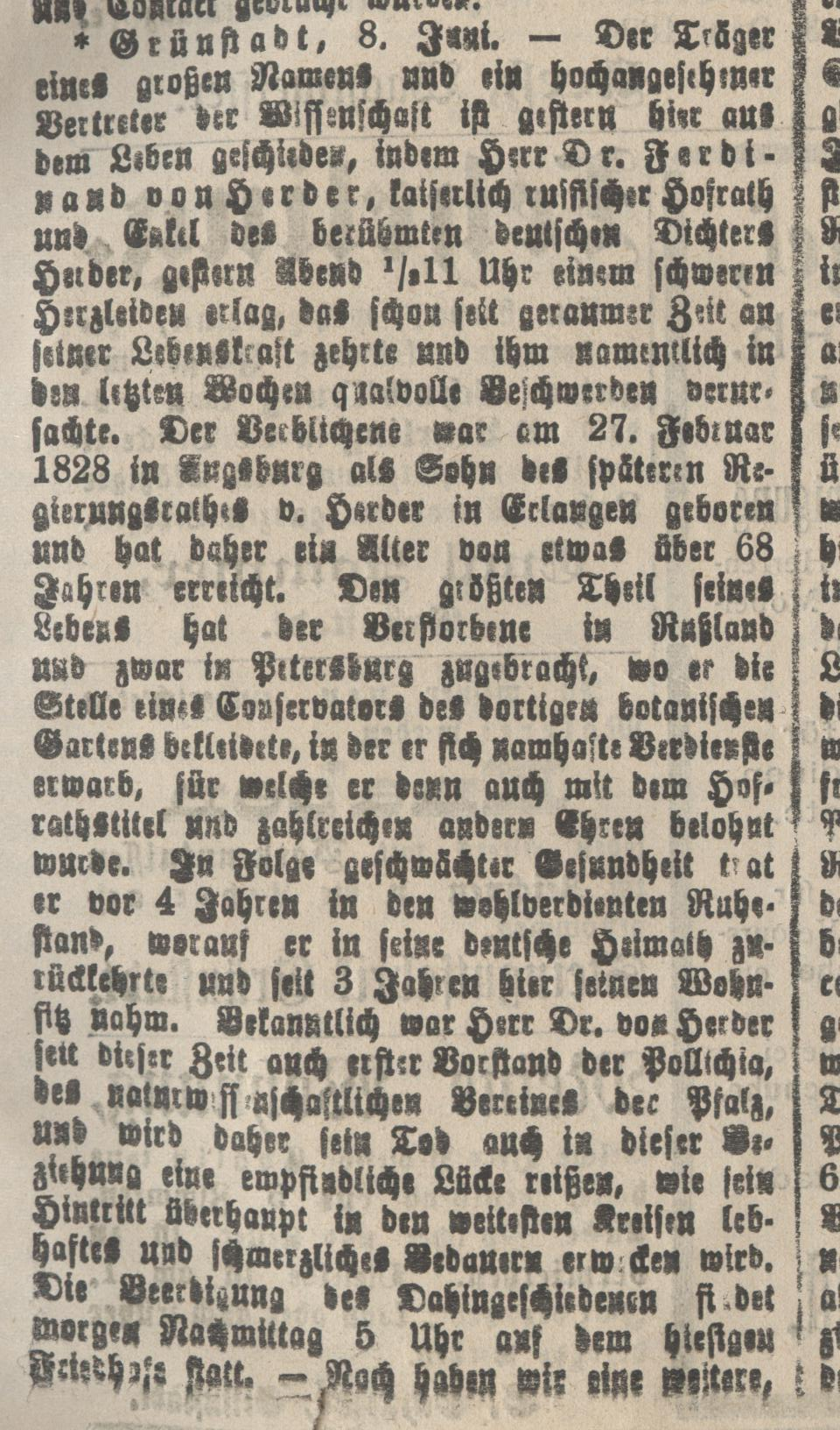 Ferdinand Gottfried von Herder, Necrolog